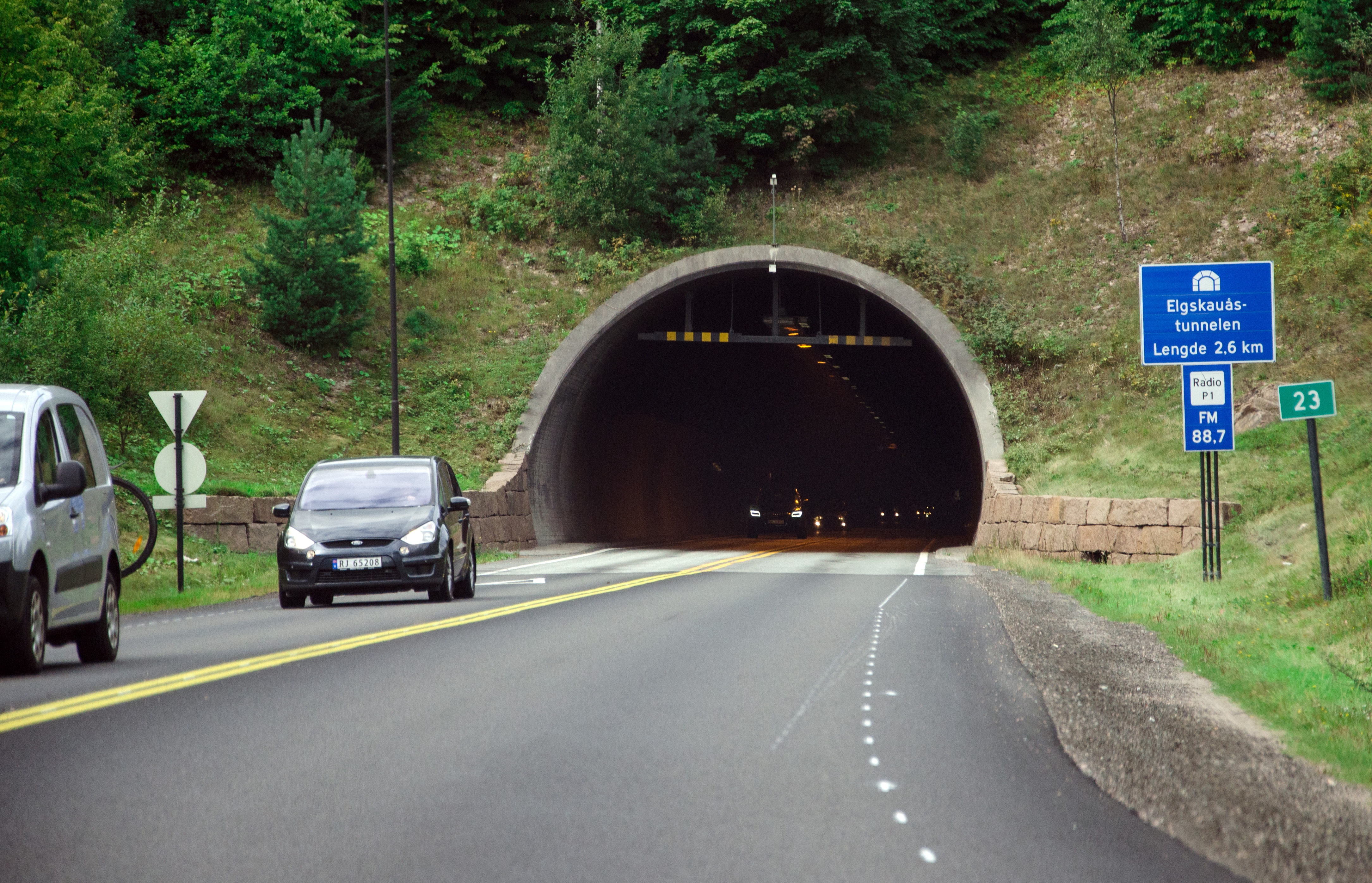 Elgskauåstunnelen på Rv23